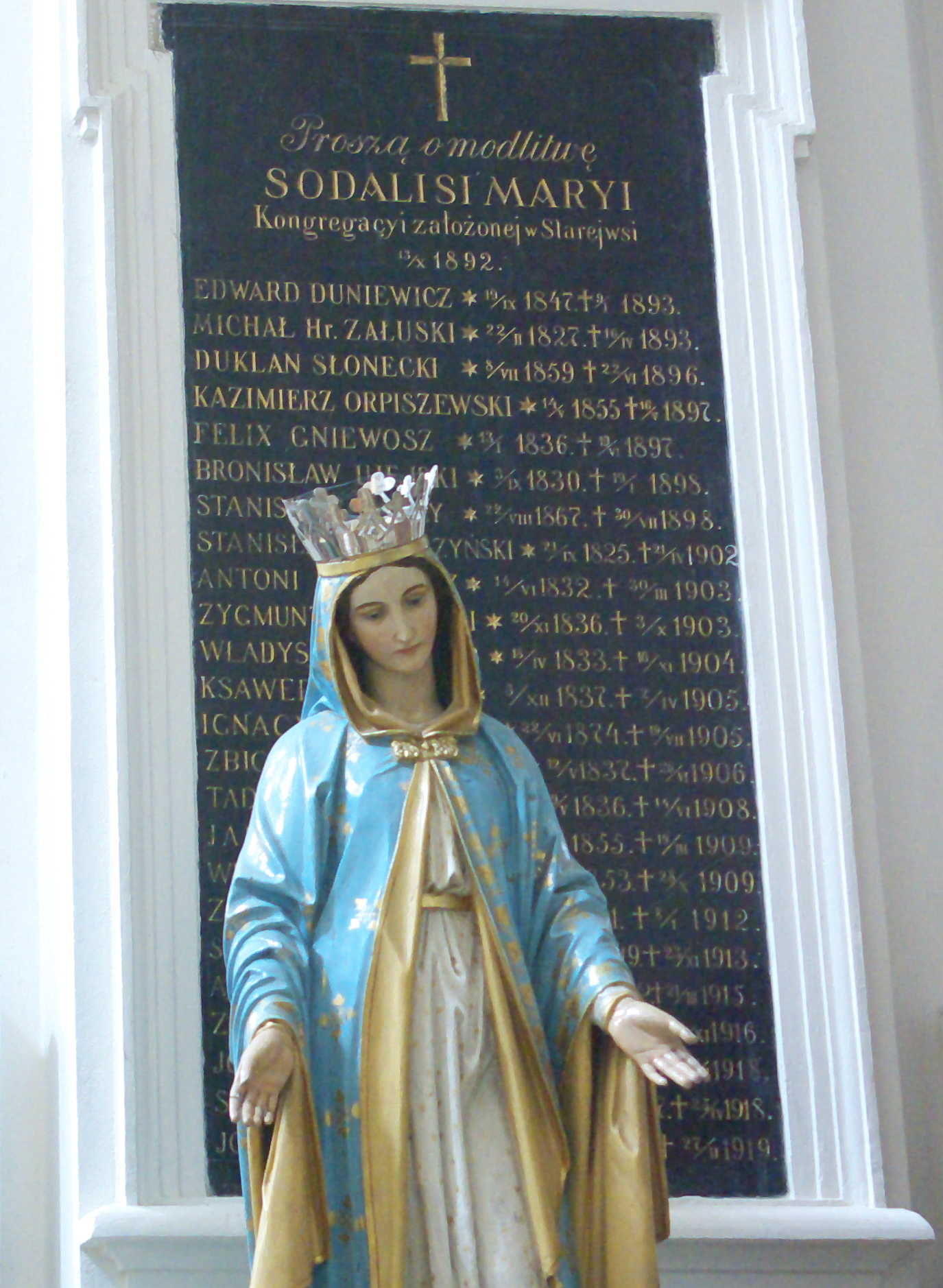 Tablica upamiętniająca członków Sodalicji Mariańskiej w bazylice Wniebowzięcia Najświętszej Maryi Panny w Starej Wsi (2017).